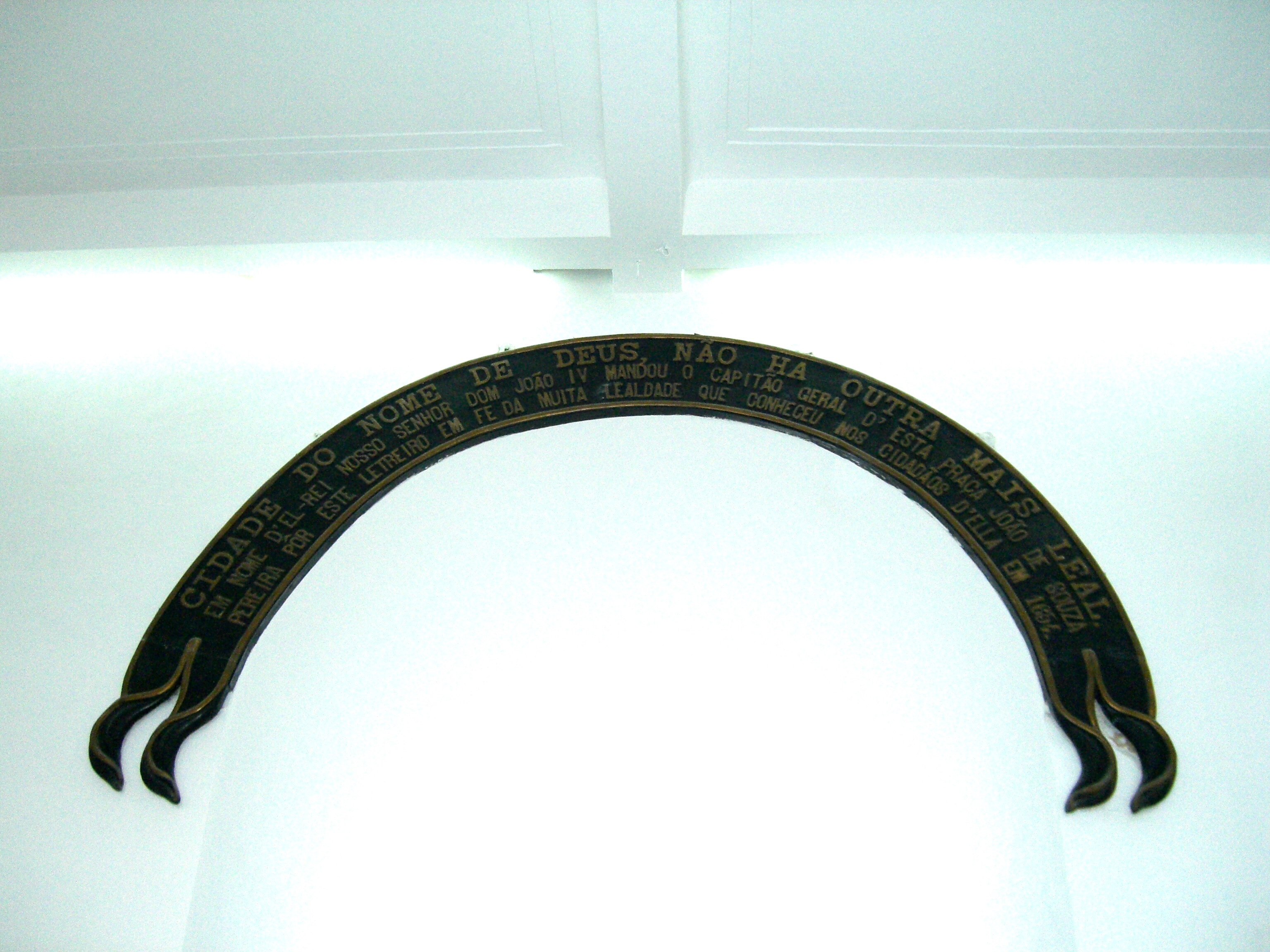 Cidade do Nome de Deus, Não ha Outra Mais Leal